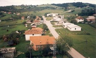 Pogled na Liskovac